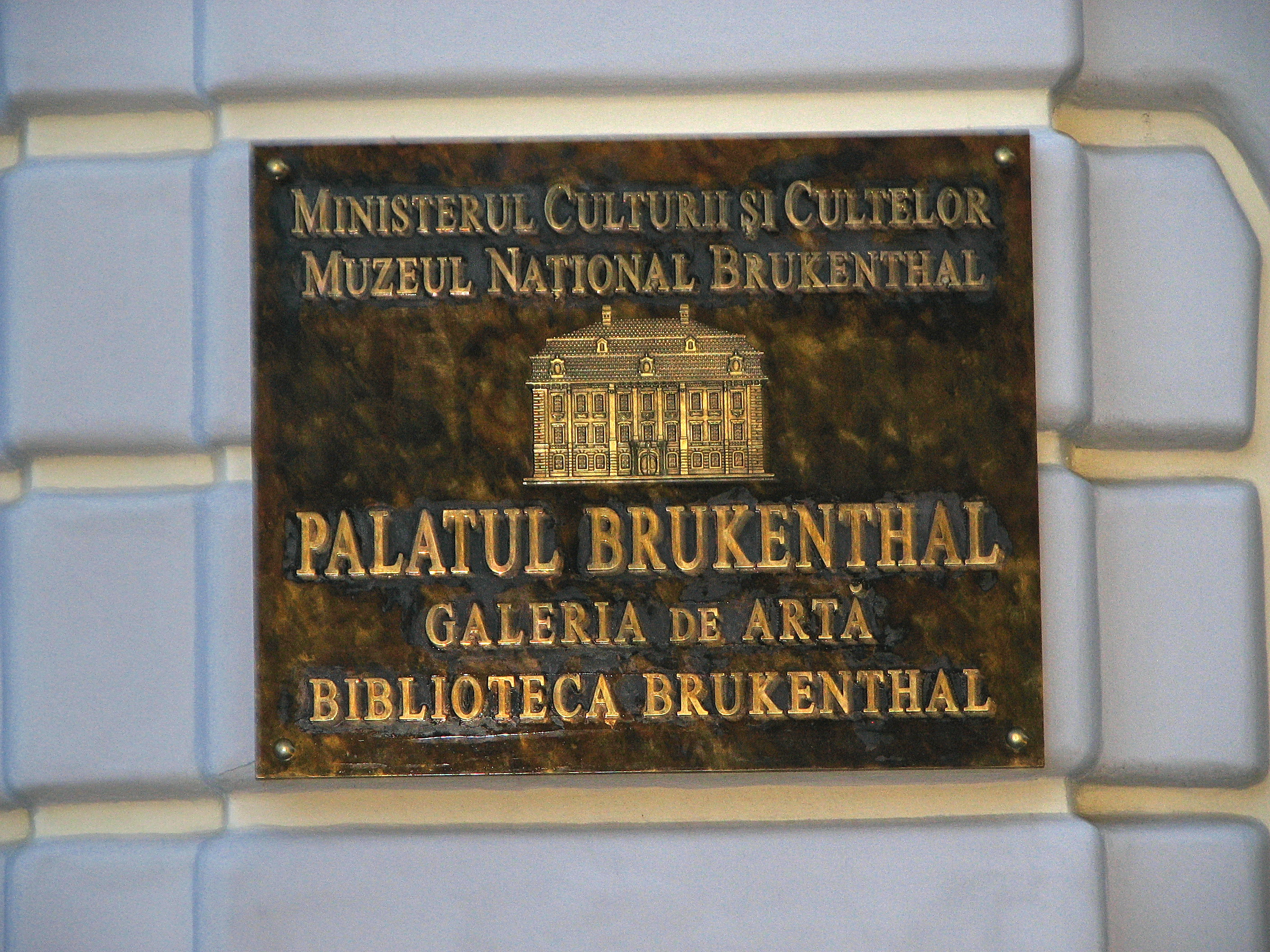 Palatul Brukenthal, Galeria de artǎ, Biblioteca Brukenthal